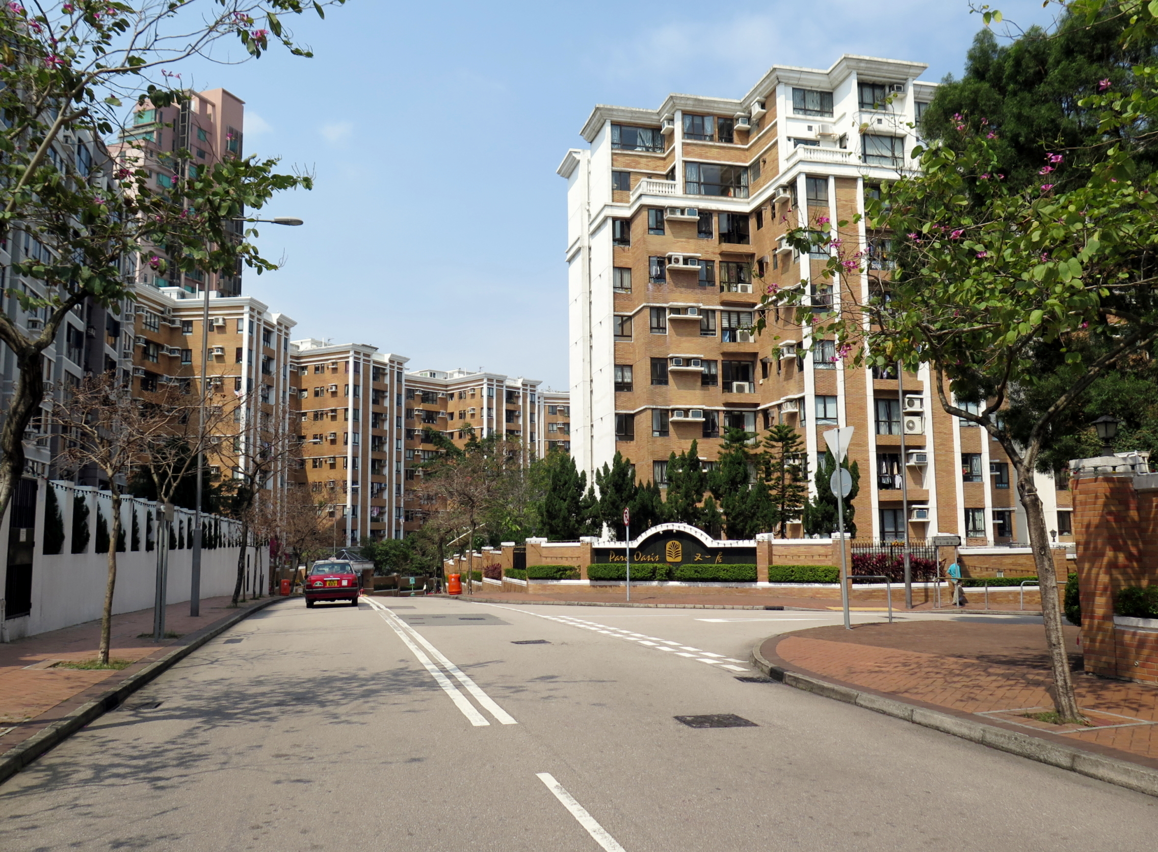 Parc Oasis, Kowloon Tong